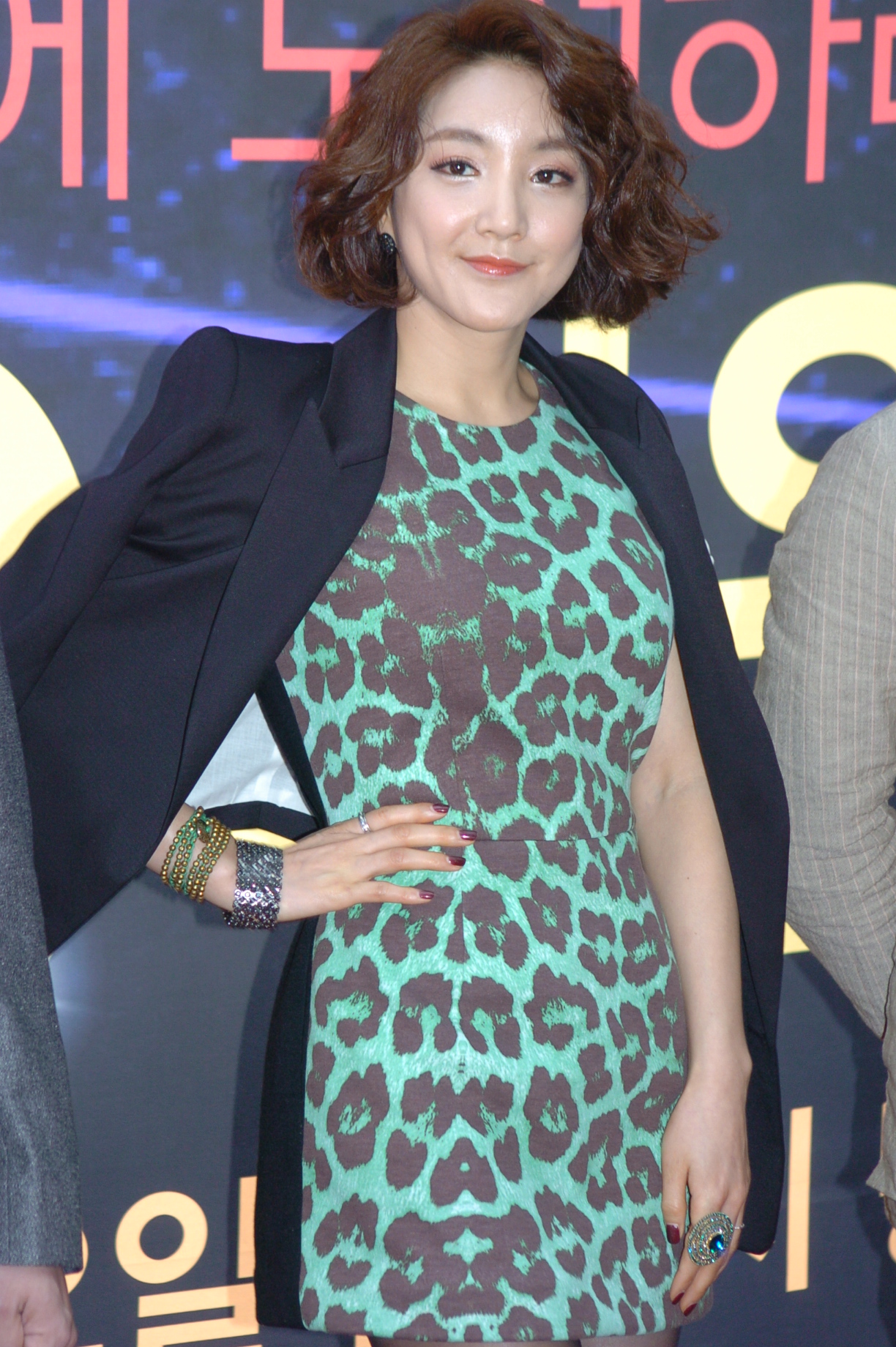 글로벌 슈퍼 아이돌